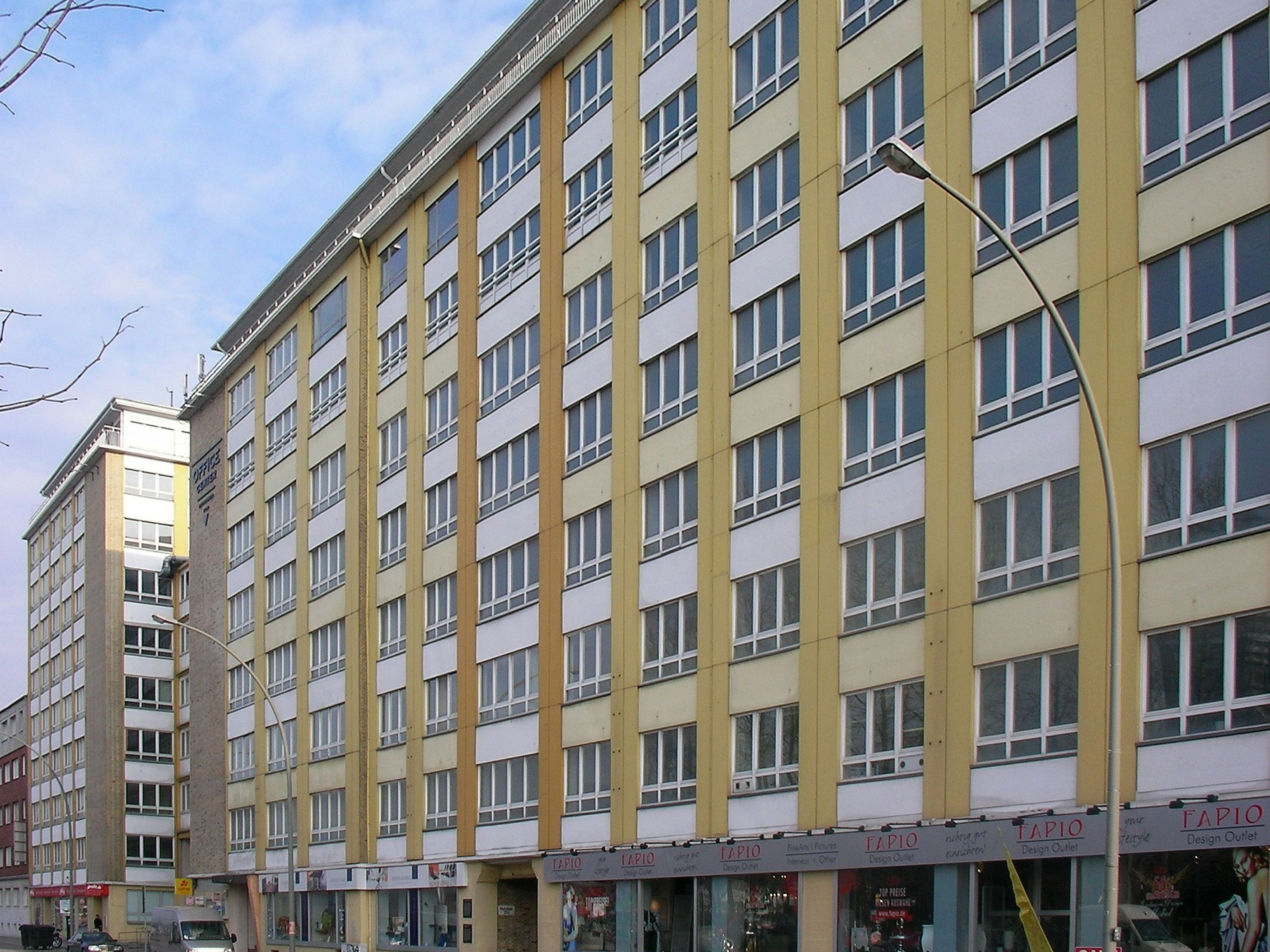 ehemaliges KZ-Außenlager Hammerbrook in der Spaldingstraße im Hamburger Stadtteil Hammerbrook, neben der Toreinfahrt in der Bildmitte sind zwei schwarze Gedenktafeln (dt. und engl.) zu erkennen